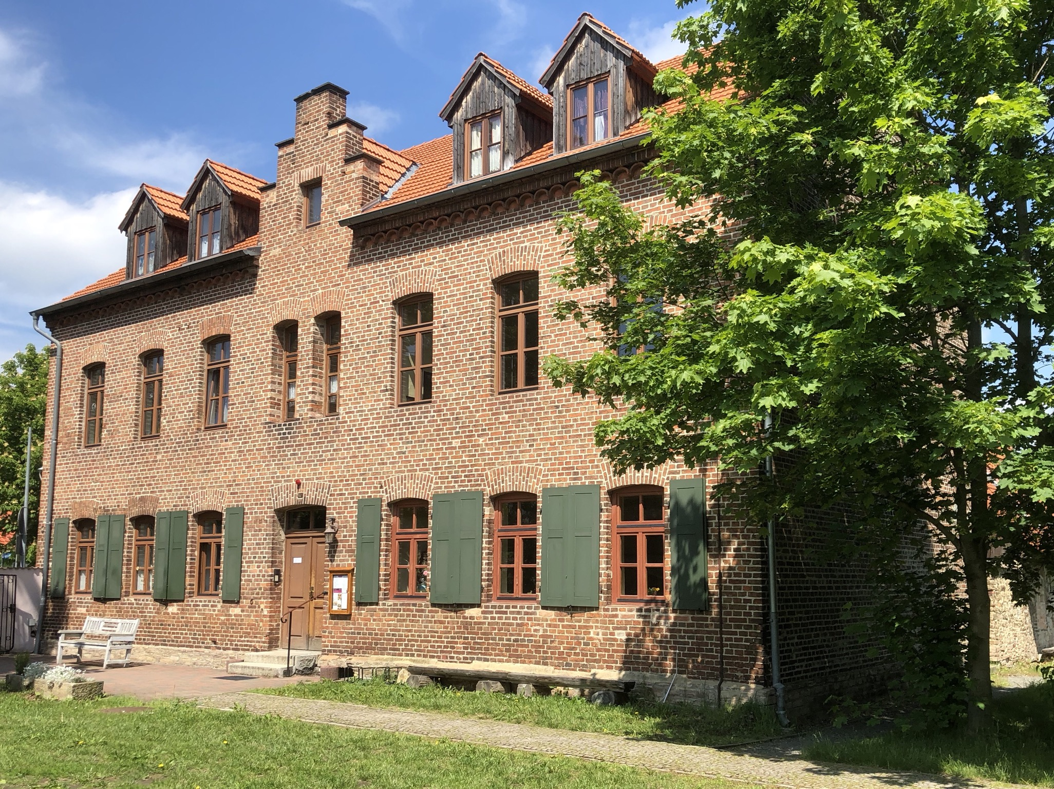 Pfarrhaus der Andreas Kirche in Thale